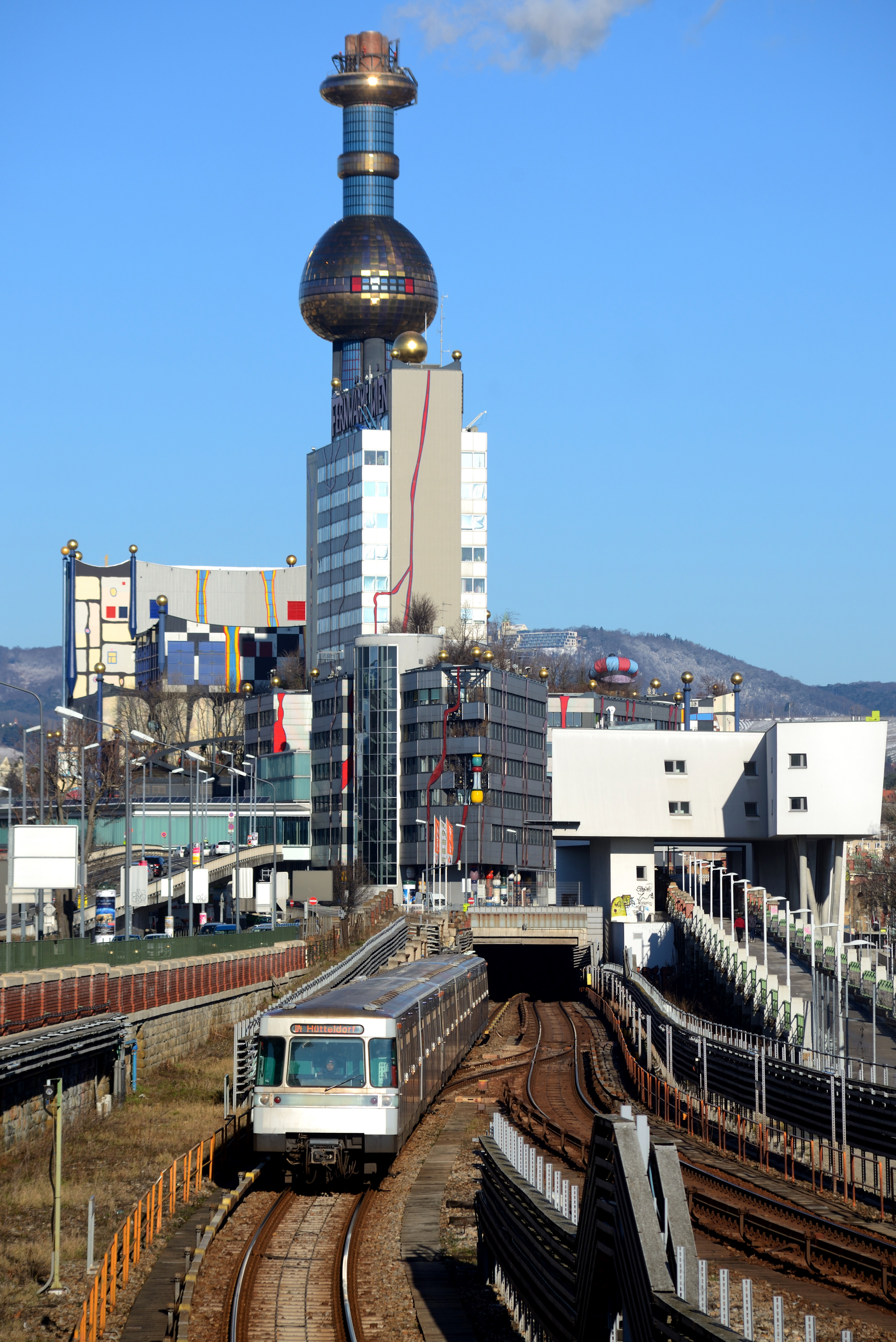 Eine U11-Garnitur auf der Linie U4 zwischen den Stationen Spittelau und Friedensbrücke.